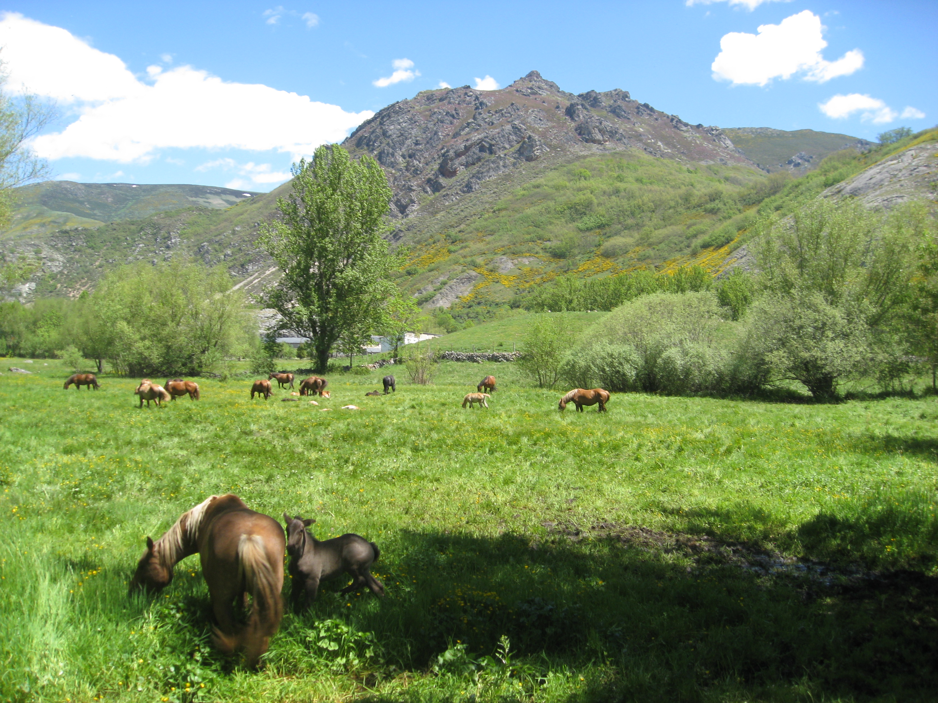 Provincia de León, España.